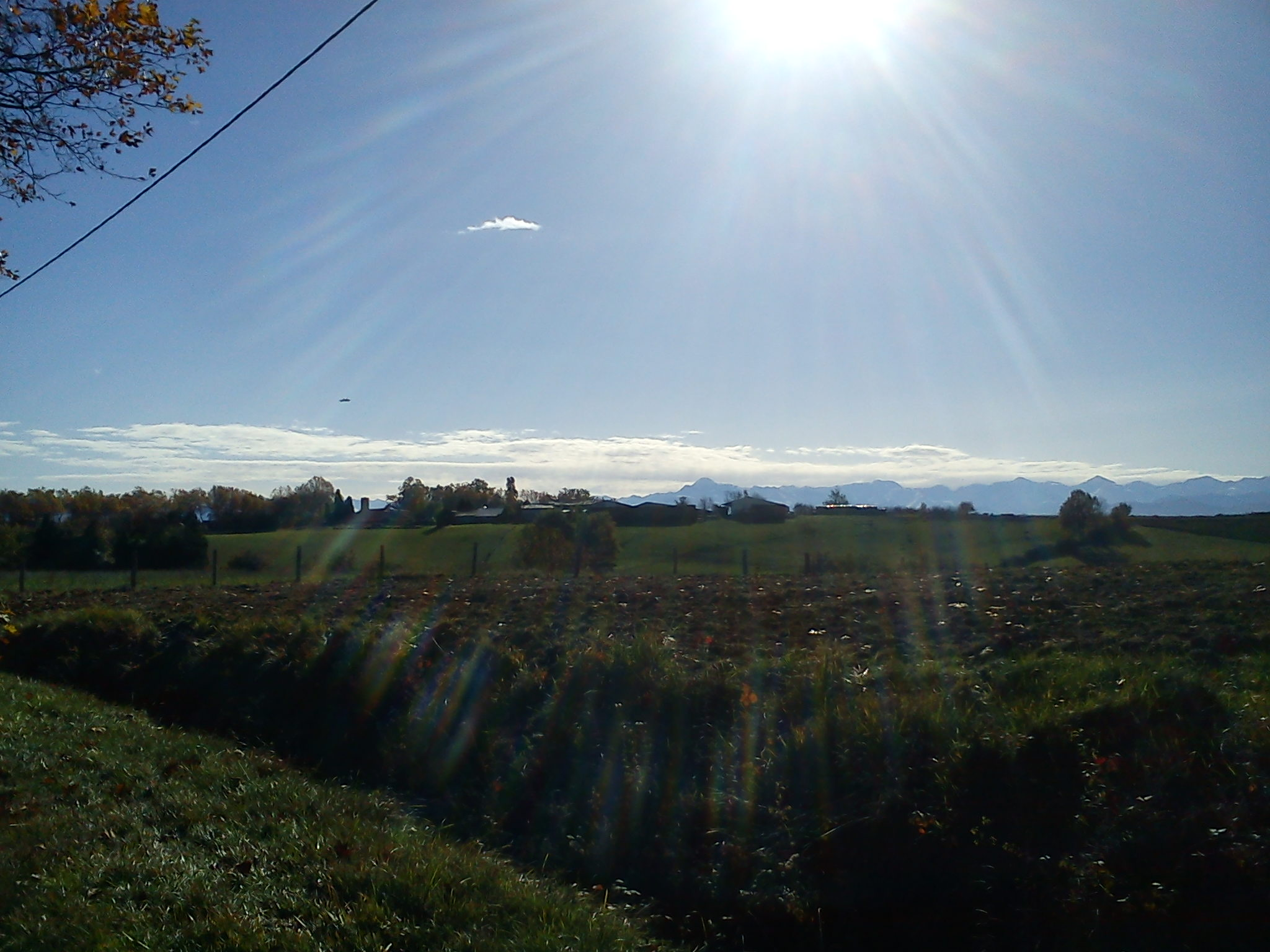 Lahitère